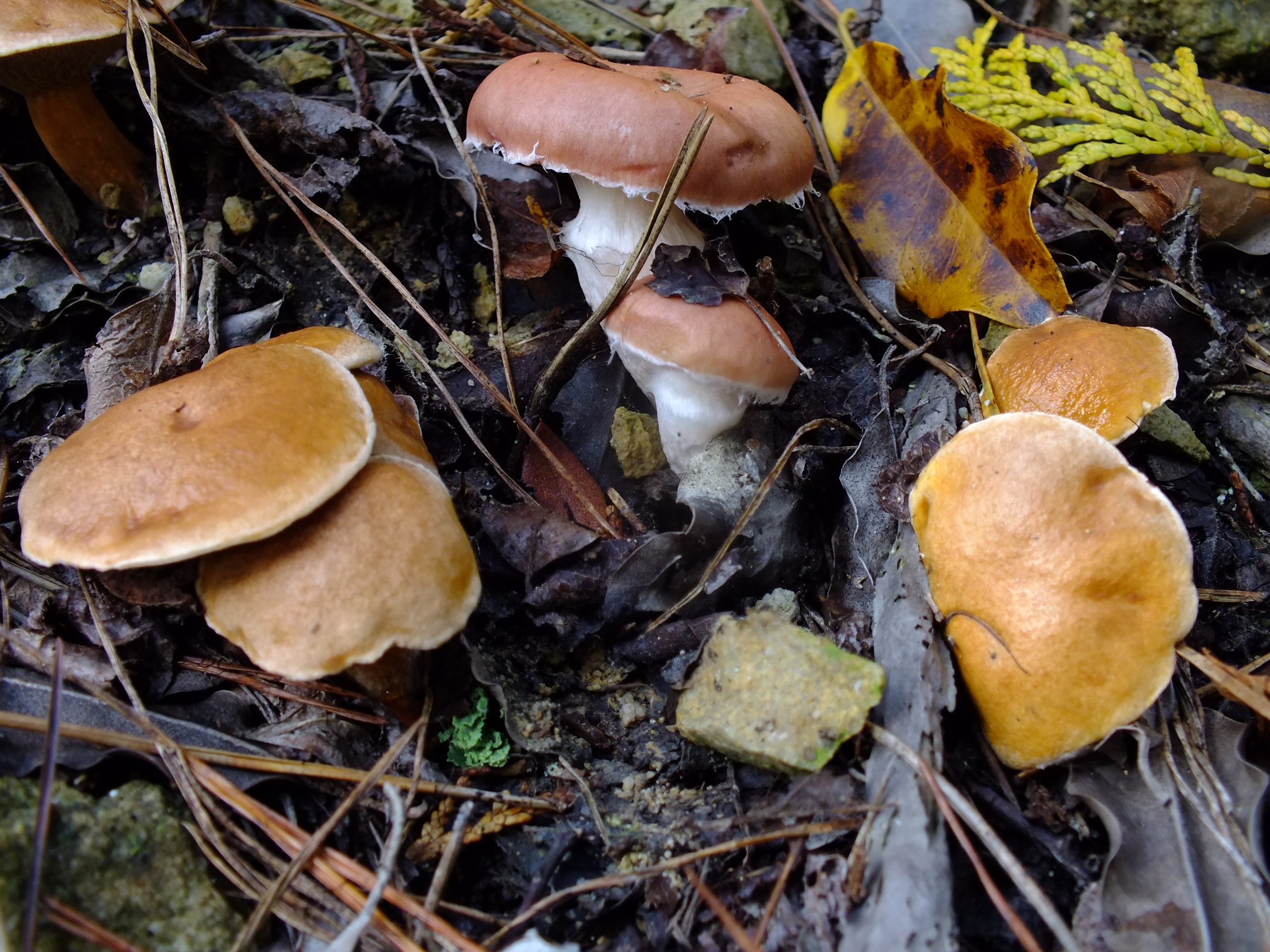 Suillus bovinus & Gomphidius roseus アミタケとオウギタケ 篠山市盃ヶ岳にて